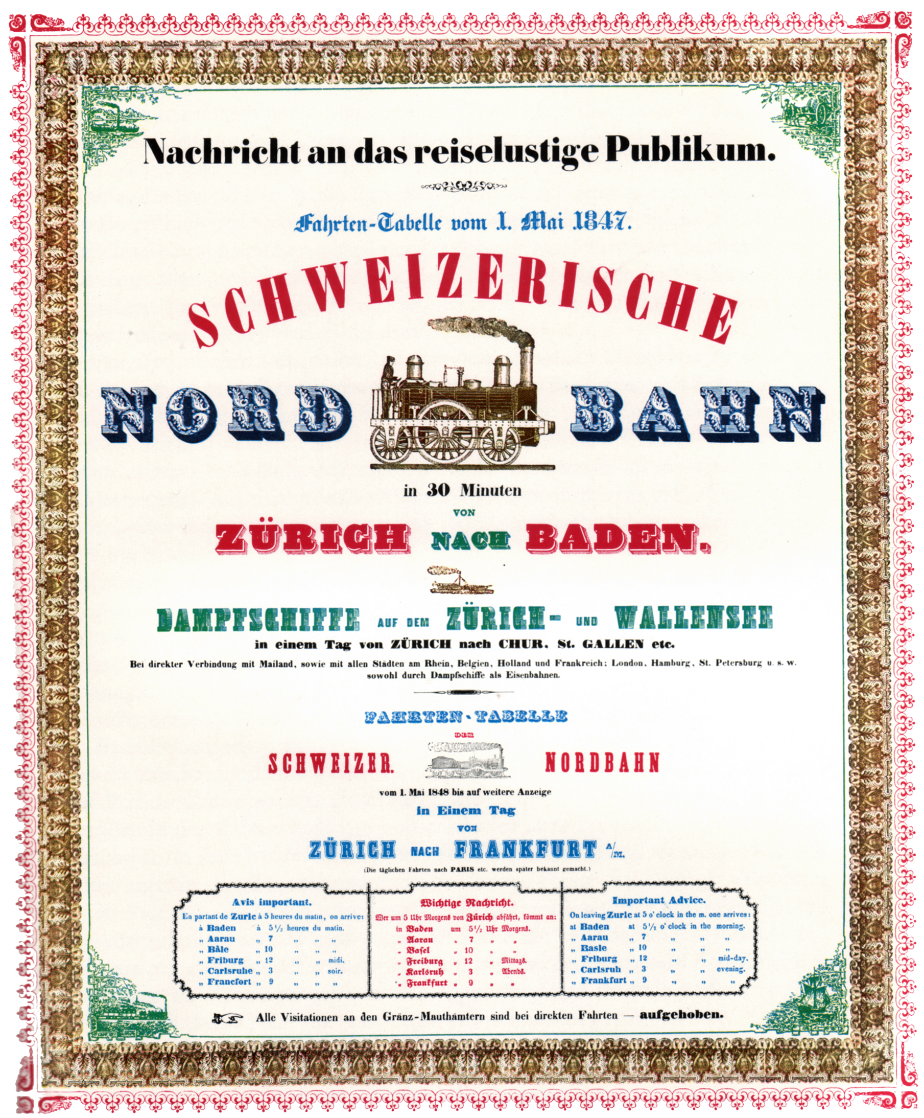 Plakat der Schweizerischen Nordbahn von 1847